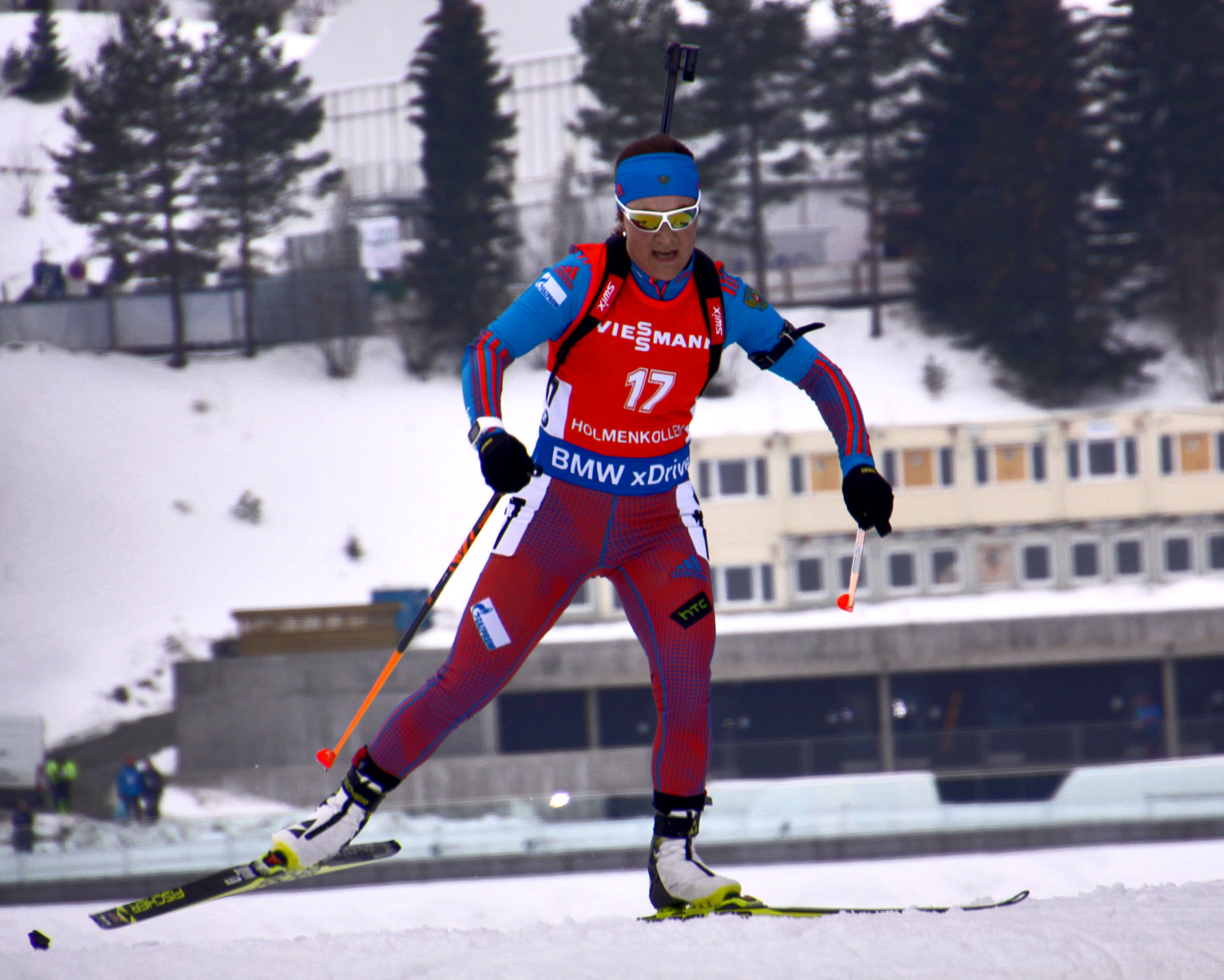 Oslo. Ekaterina Yurlova aux championnats du monde de biathlon.